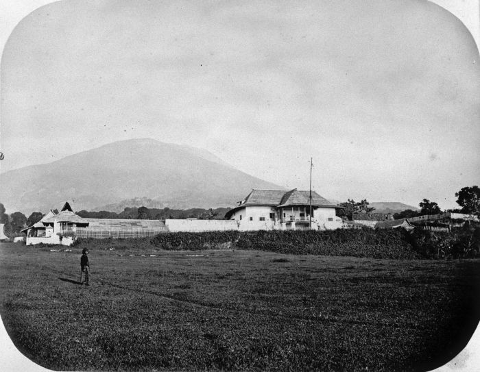 Foto. Het paleis van de sultan van Ternate